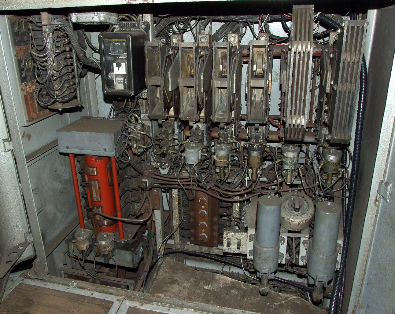 M40 sorozatú dízelmozdony erősáramú készülékszekrénye a vezetőfülkében. Jobbra és fent: kontaktorok, balra lent: irányváltó